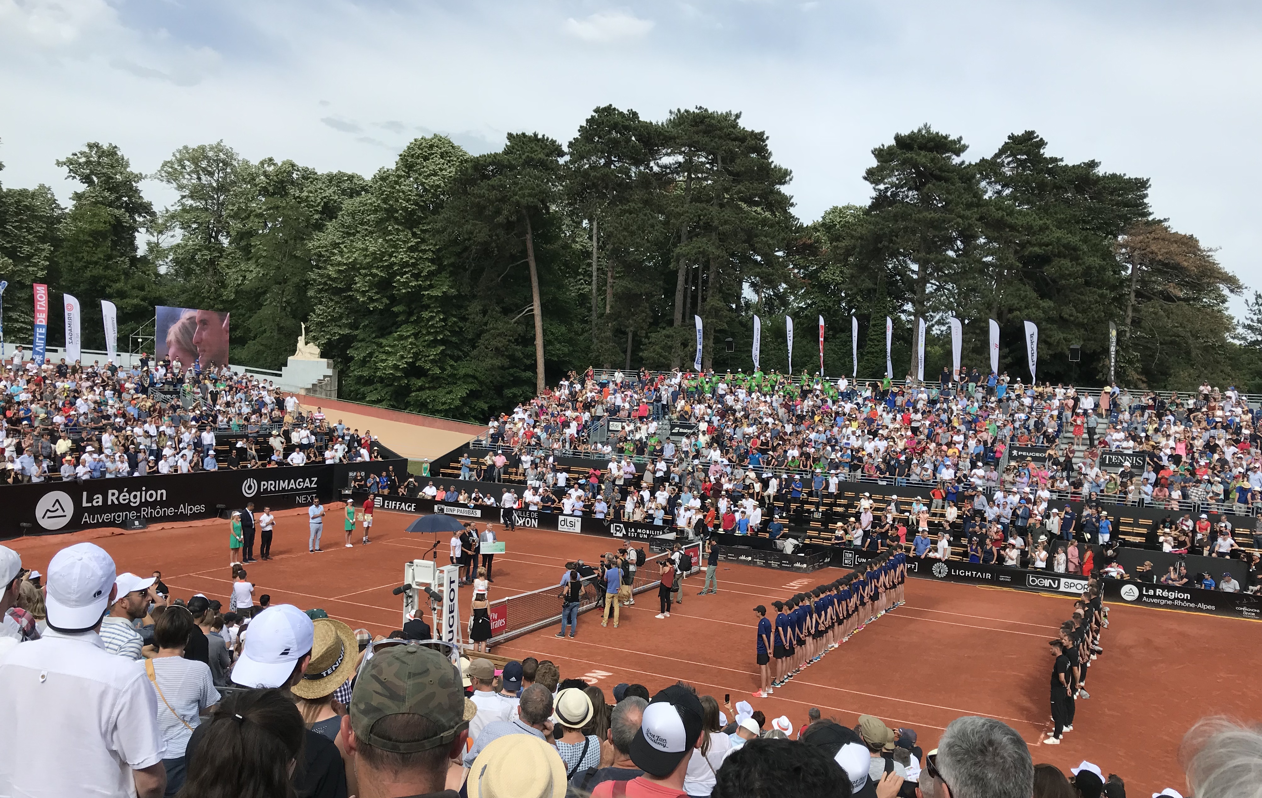 Finale de l'Open Parc Auvergne - Rhône-Alpes de Lyon, 26 mai 2018.